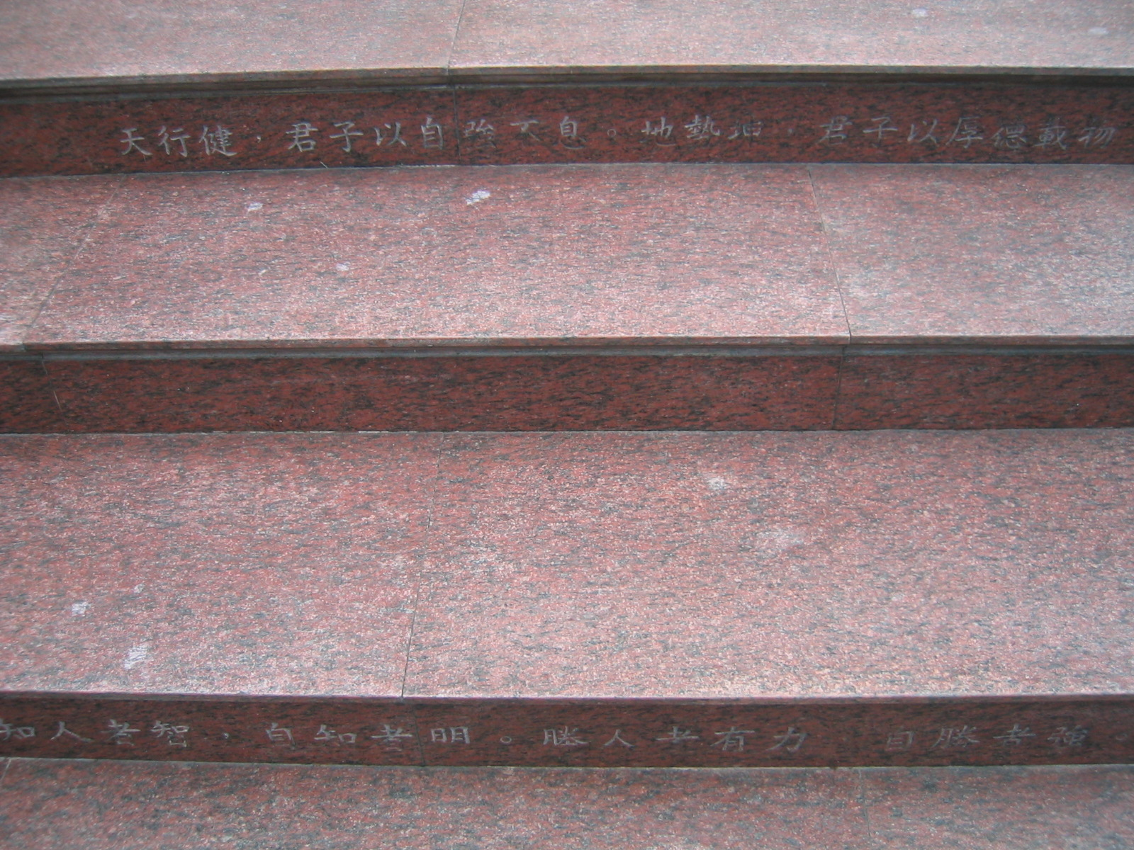 Hong Kong Central Library, Causeway Bay, Hong Kong